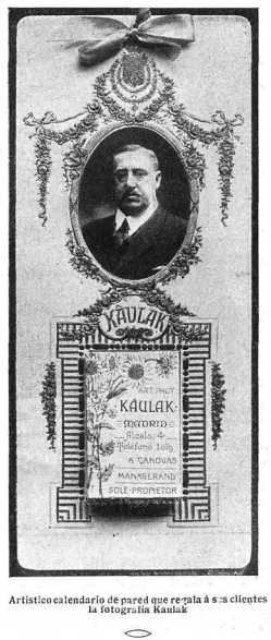 Pubblicità dello studio fotografico KAULAK di Madrid apparsa su Mundo Grafico del 11-6-1913